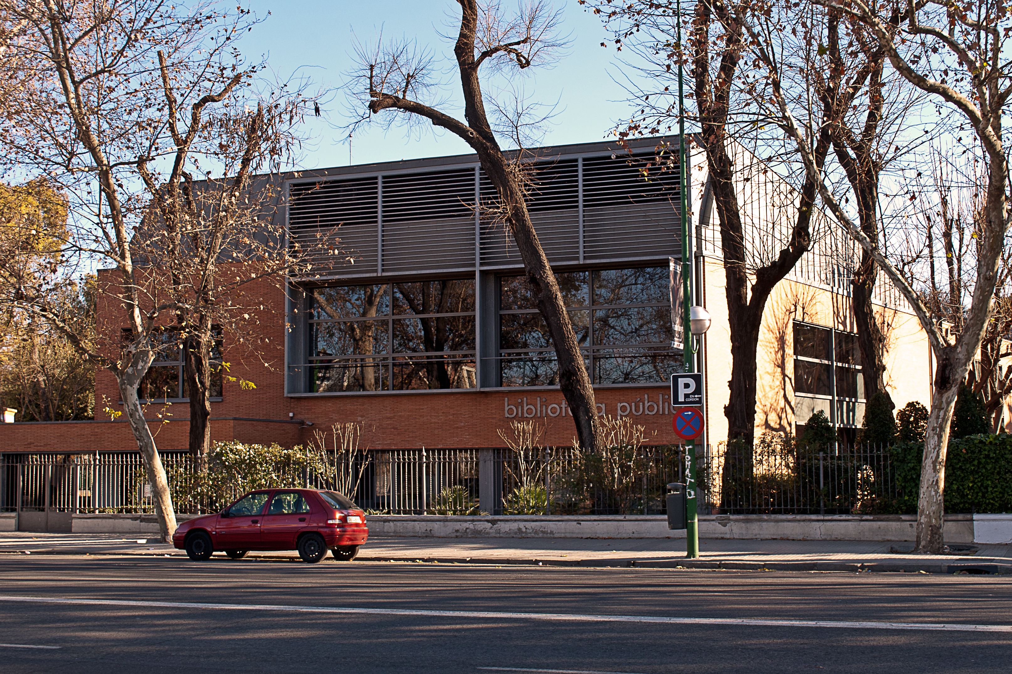 Biblioteca pública infanta Elena, Sevilla. Arquitectos Cruz y Ortiz.